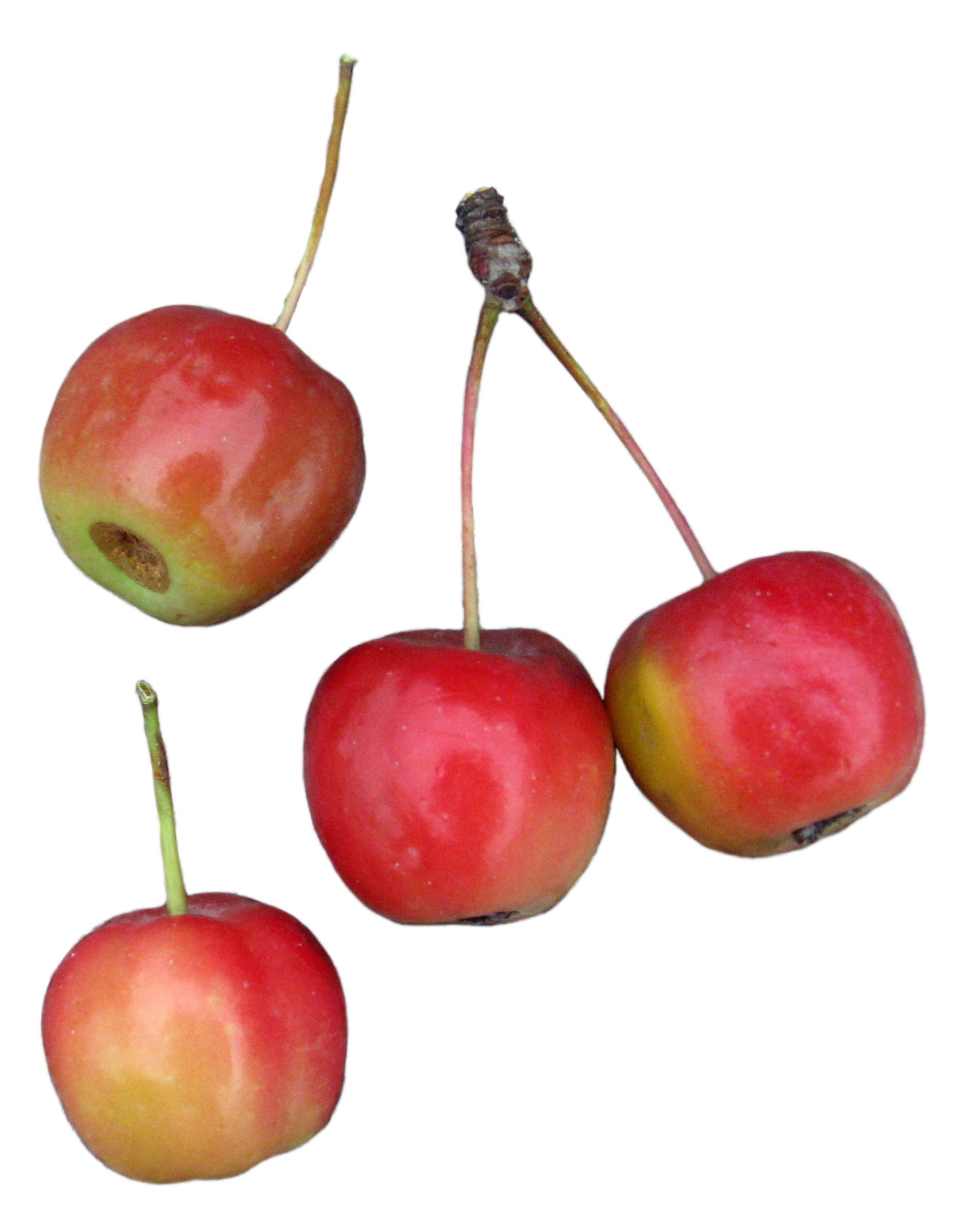 odrůda Red Sentinel